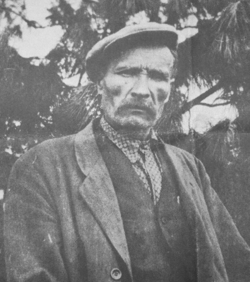 Juho Vihtori Nätti alias ”Nätti-Jussi”.